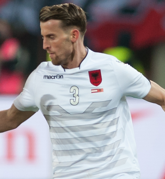 Wien, 26.03.2016, ÖFB Laenderspiel Oesterreich vs Albanien. Bild zeigt Florian Klein (AUT) und Ermir Lenjani (ALB).